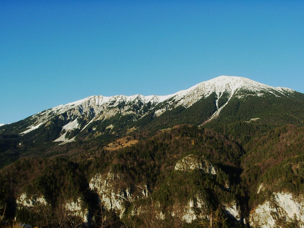 Stol, najvišji vrh Karavank, slikan s Peči Hochstuhl